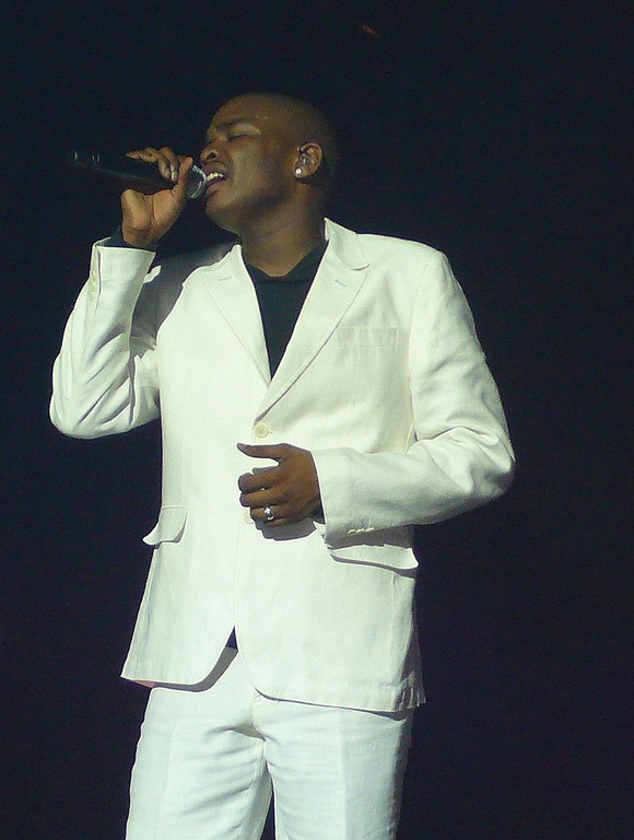 Cyril Cinelu en concert Star Academy 6 à Bruxelles